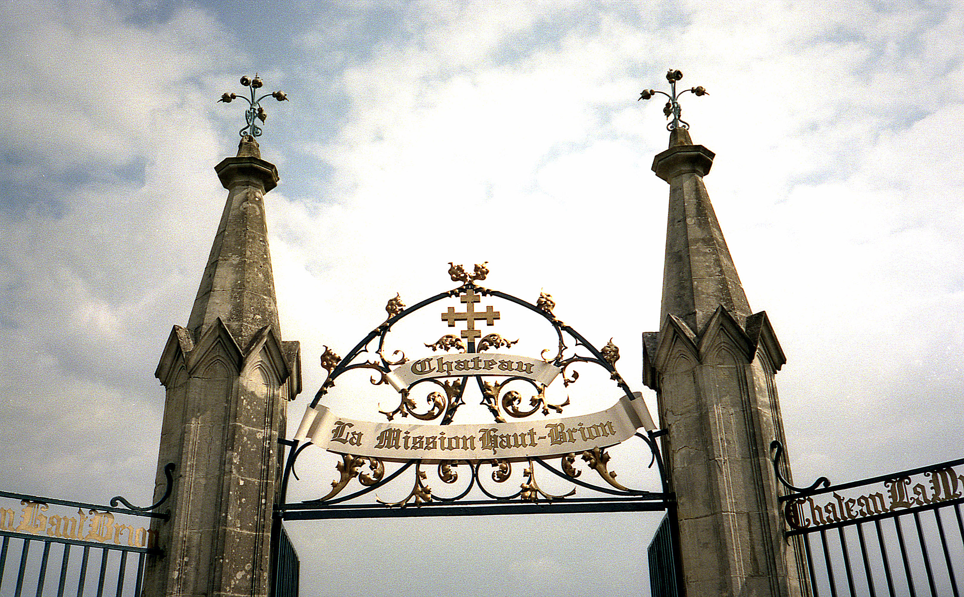 Château La Mission Haut-Brion - Bordeaux - Pessac-Léognan